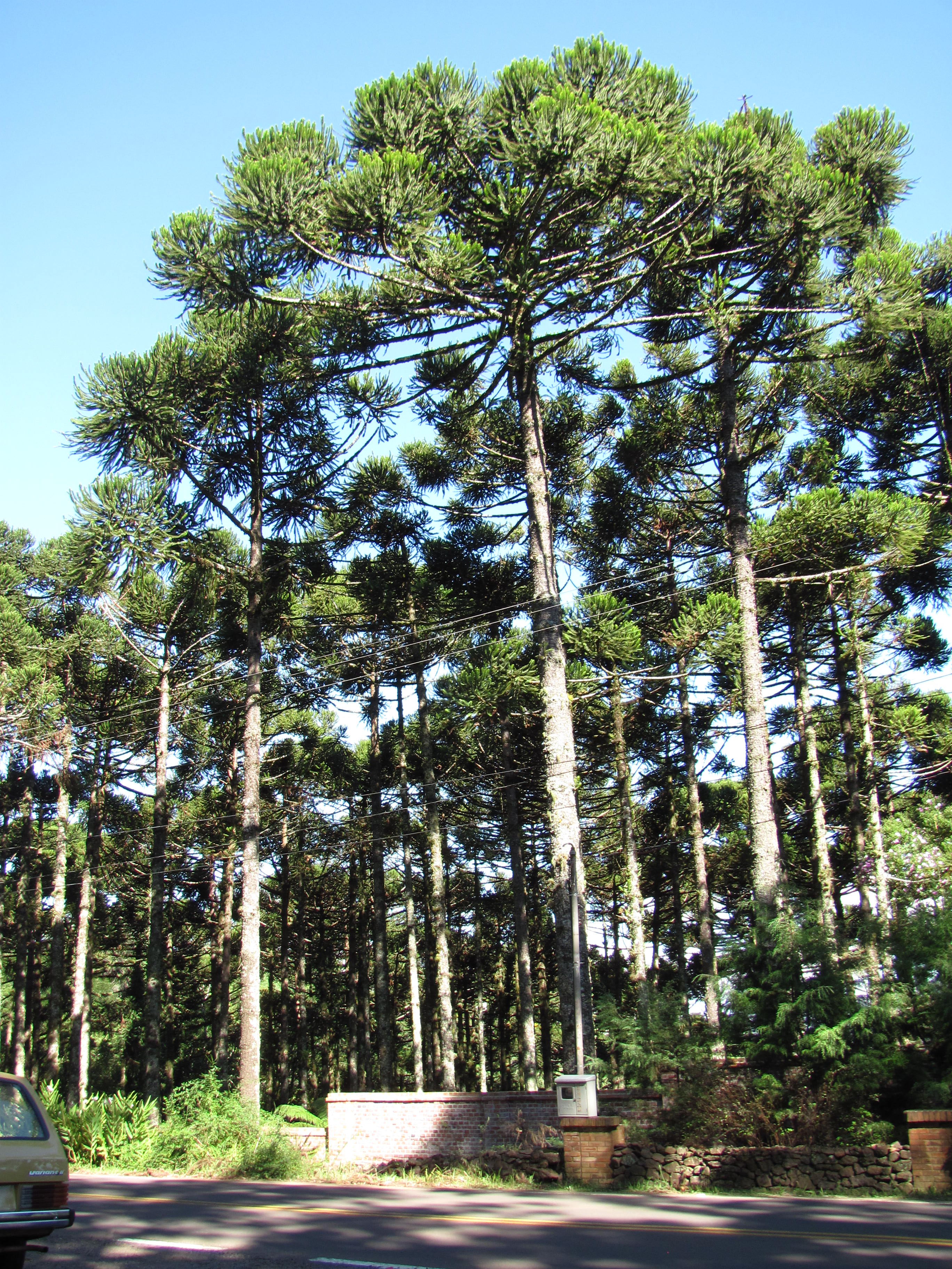 Árvores em Morro Reuter